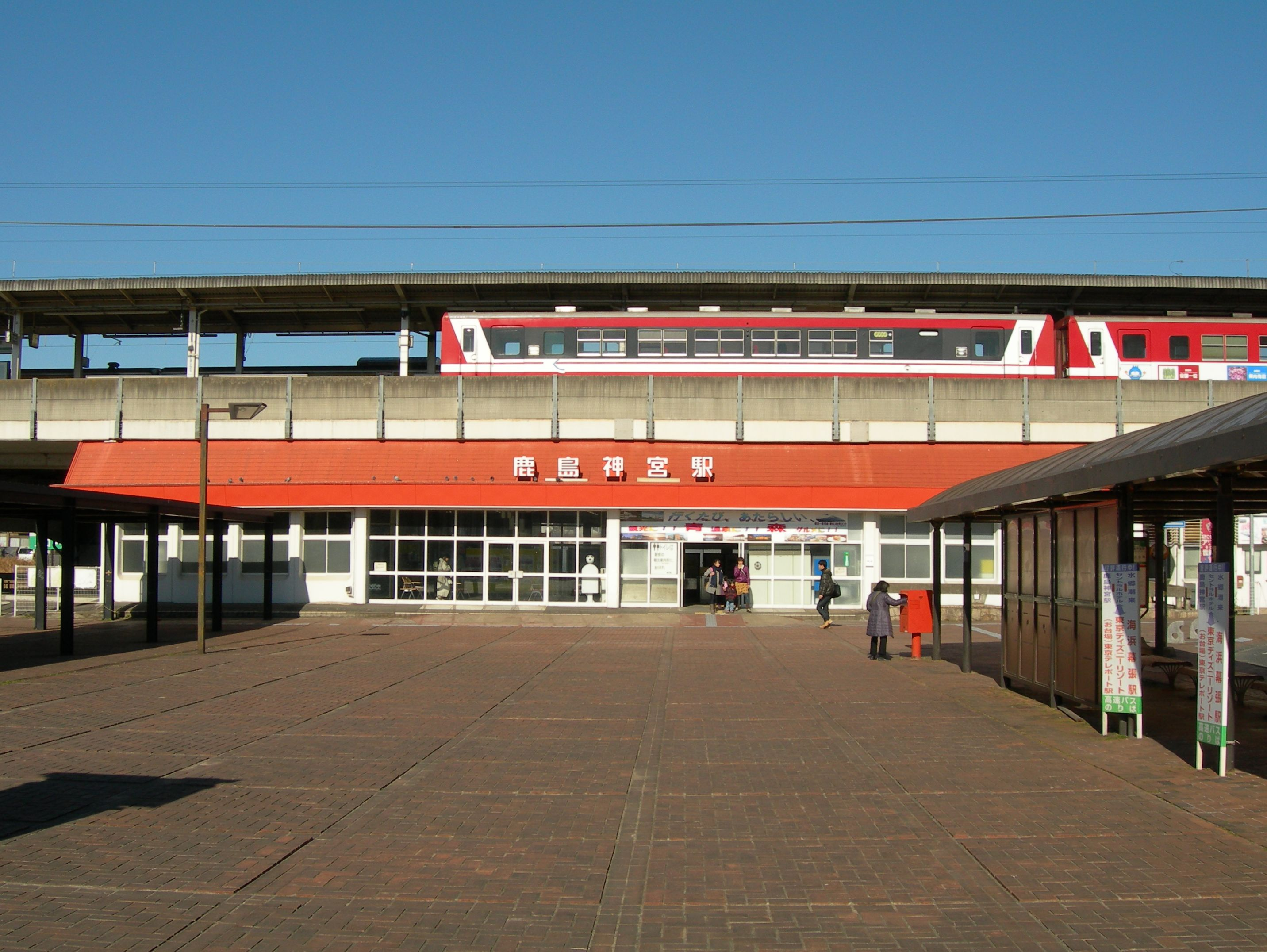 鹿島神宮駅